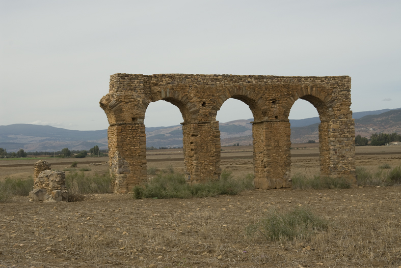 Römisches Aquädukt in Chimtou, Tunesien